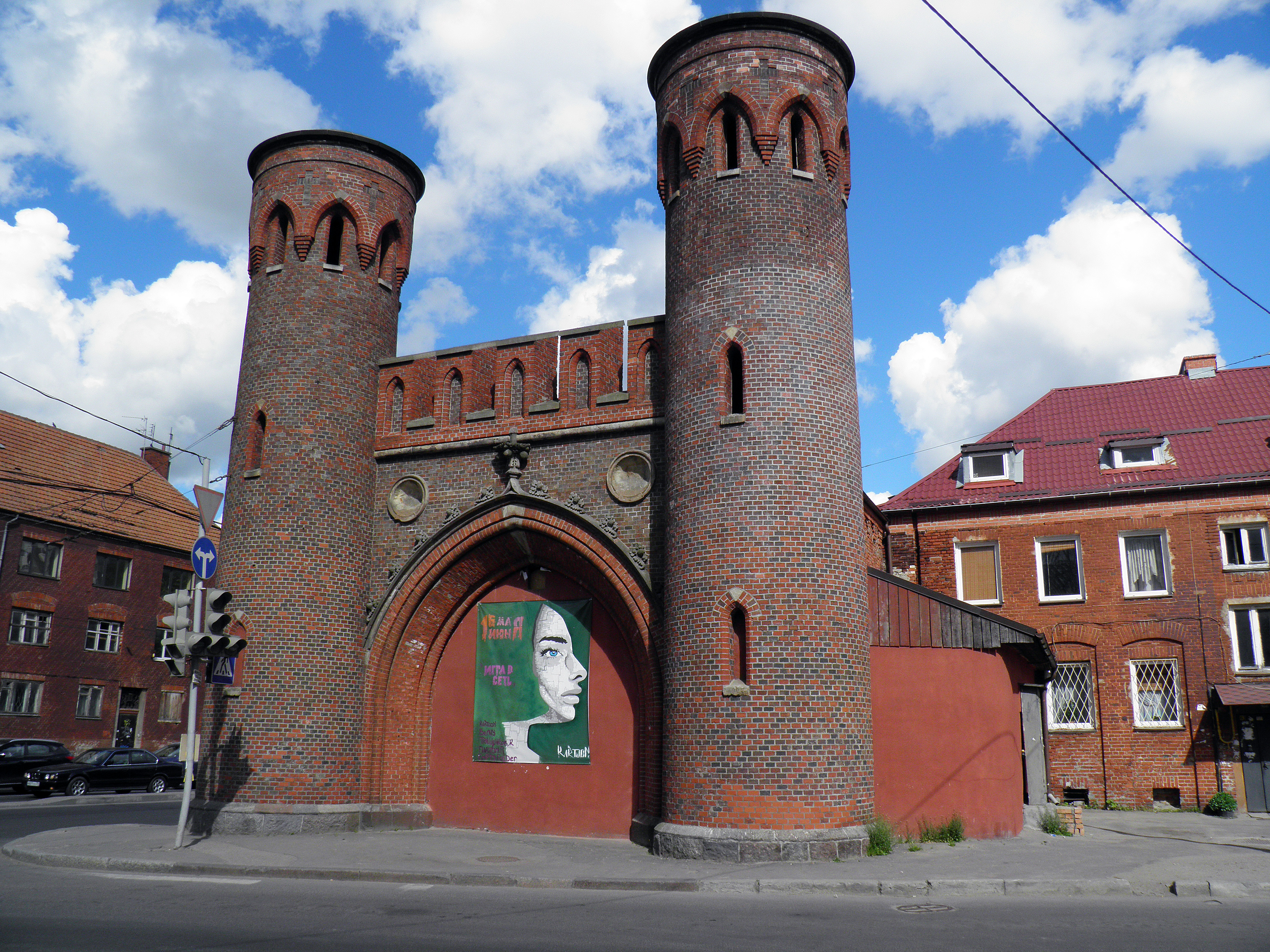 Городские ворота № 3 [Закхаймские] (Калиниградская область, Калининград, Литовский вал, 61)